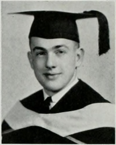 Robert Maze